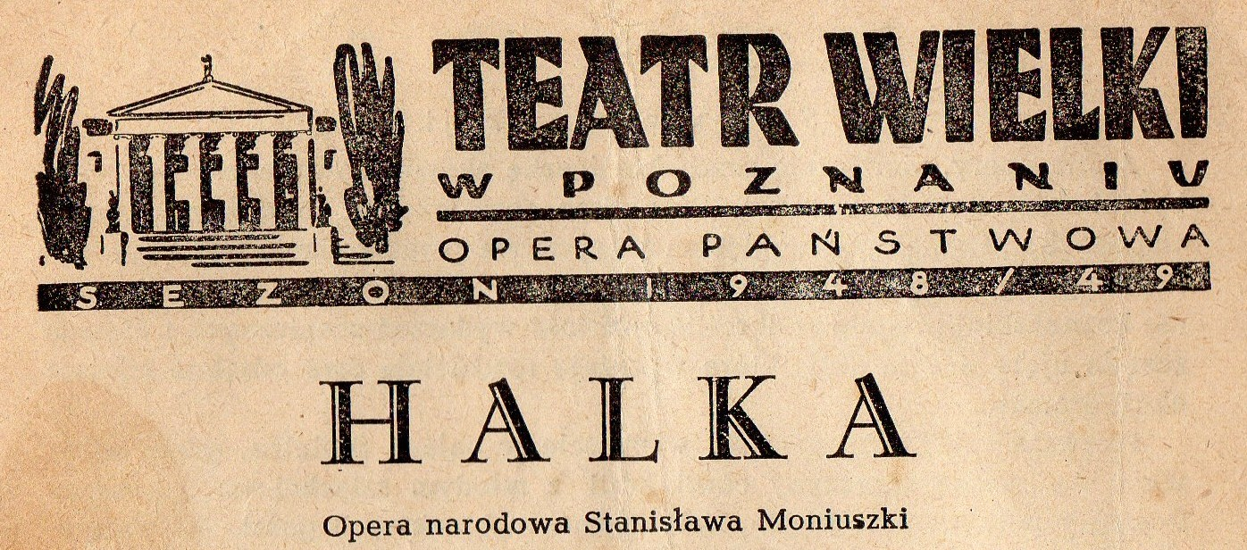 Program Halki z Poznania - sezon 1948/1949.